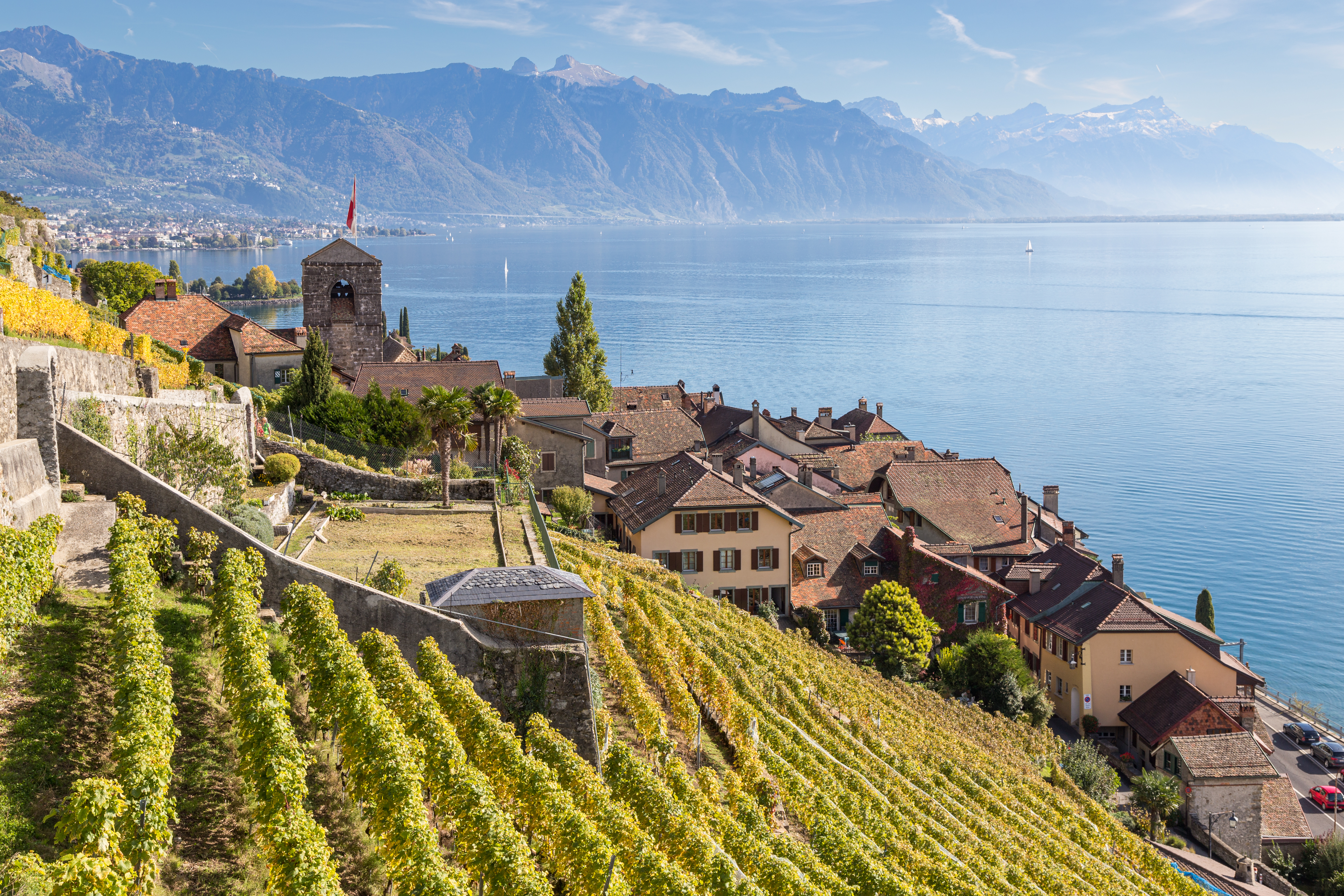 St-Saphorin (Lavaux)